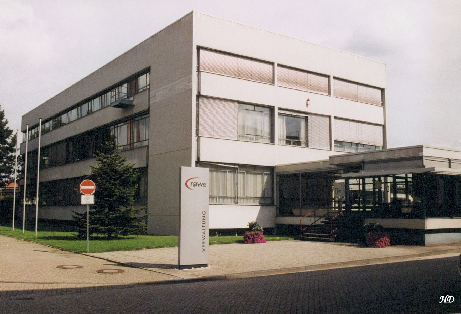 Verwaltungsgebäude im Jahre 2001